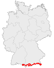 Course Map of Deutsche Alpenstraße